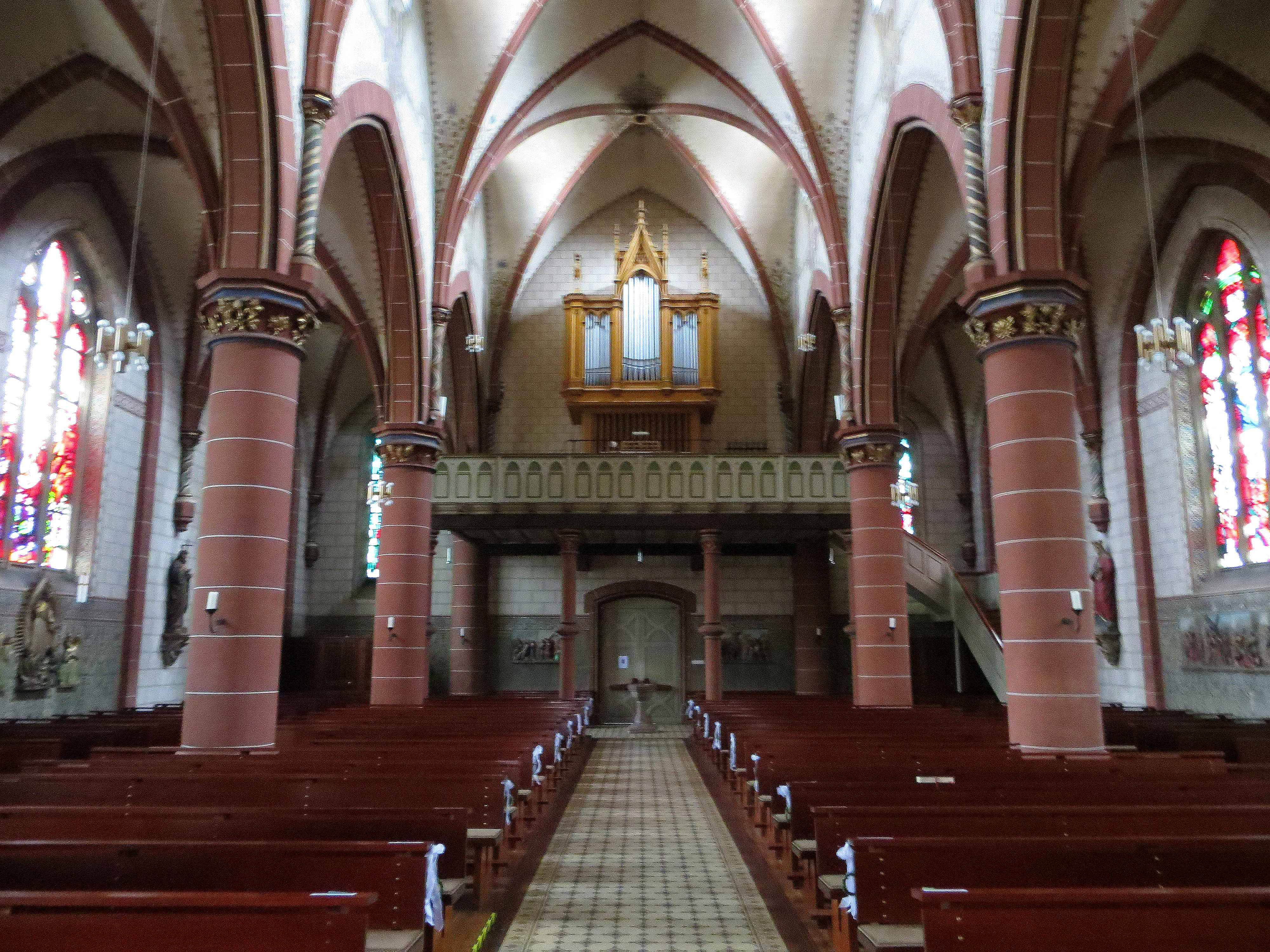 Blick ins Innere der katholischen Pfarrkirche St. Petrus in Ketten in Hilbringen, einem Stadtteil von Merzig, Landkreis Merzig-Wadern, Saarland.